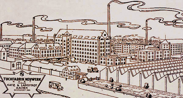 Schaubild der Tuchfabrik Neuwerk von Katz & Langstadt, vormals Pastor, in Aachen